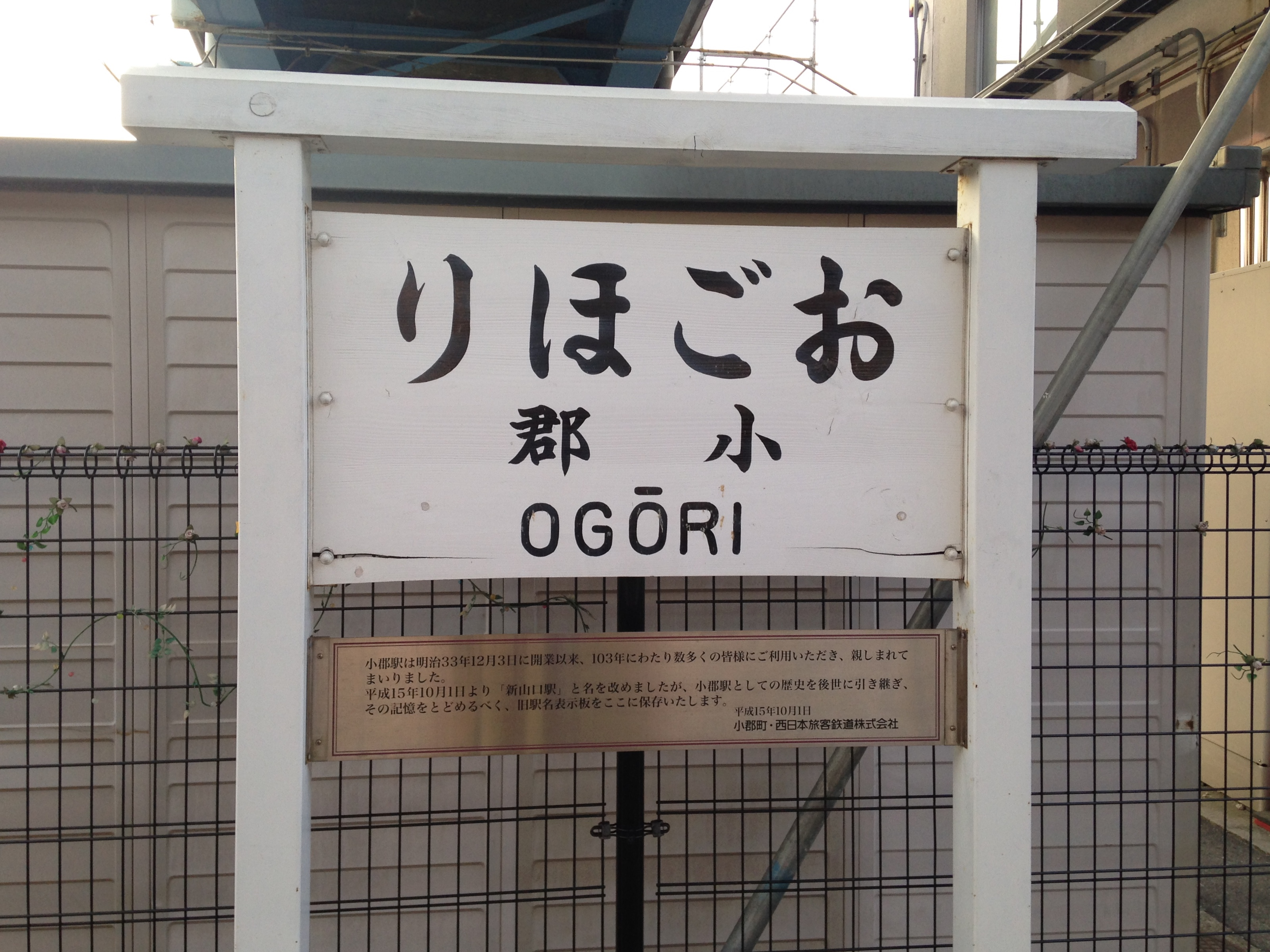 新山口駅の旧駅名表示板。「小郡」は歴史的仮名遣いで「をごほり」であるが、駅名標では「おごほり」と表記する